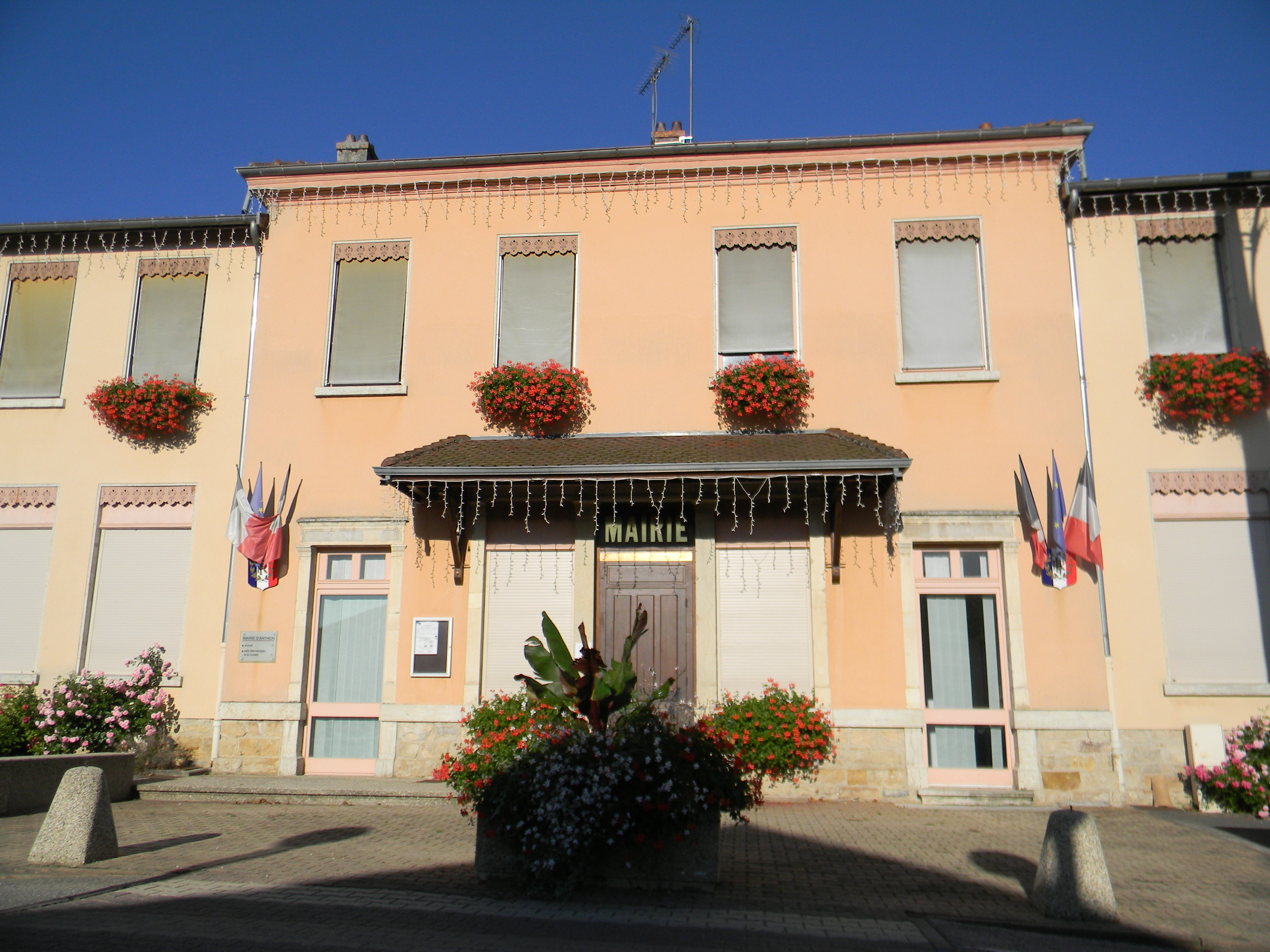 Mairie d'Anthon.